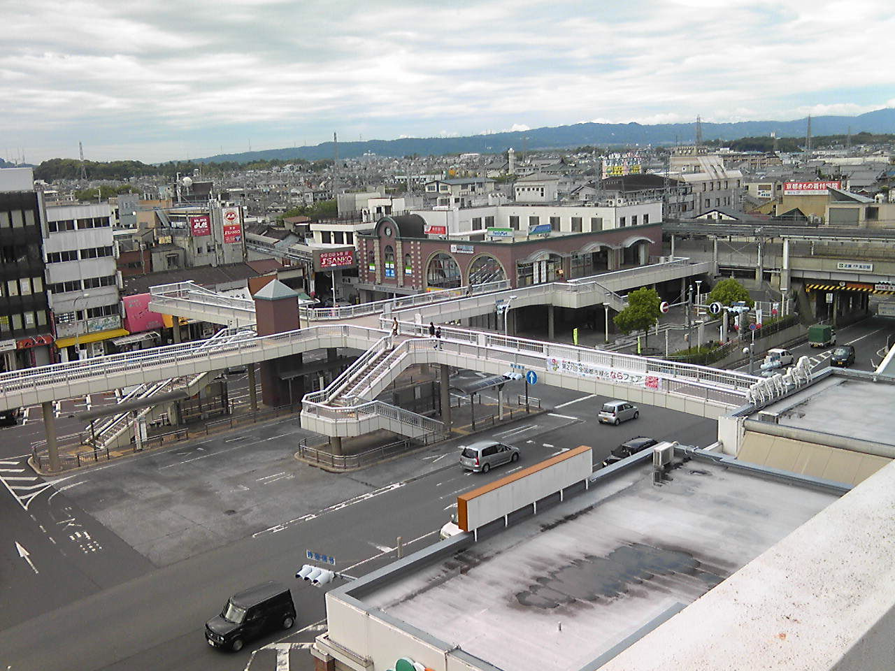 近鉄大和高田駅前周辺